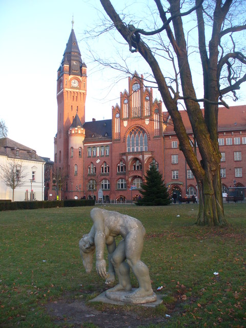 Koepenick - Luisenhain